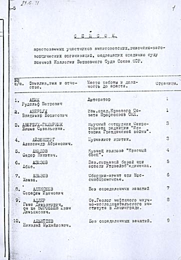 Альметьев, Николай Михайлович